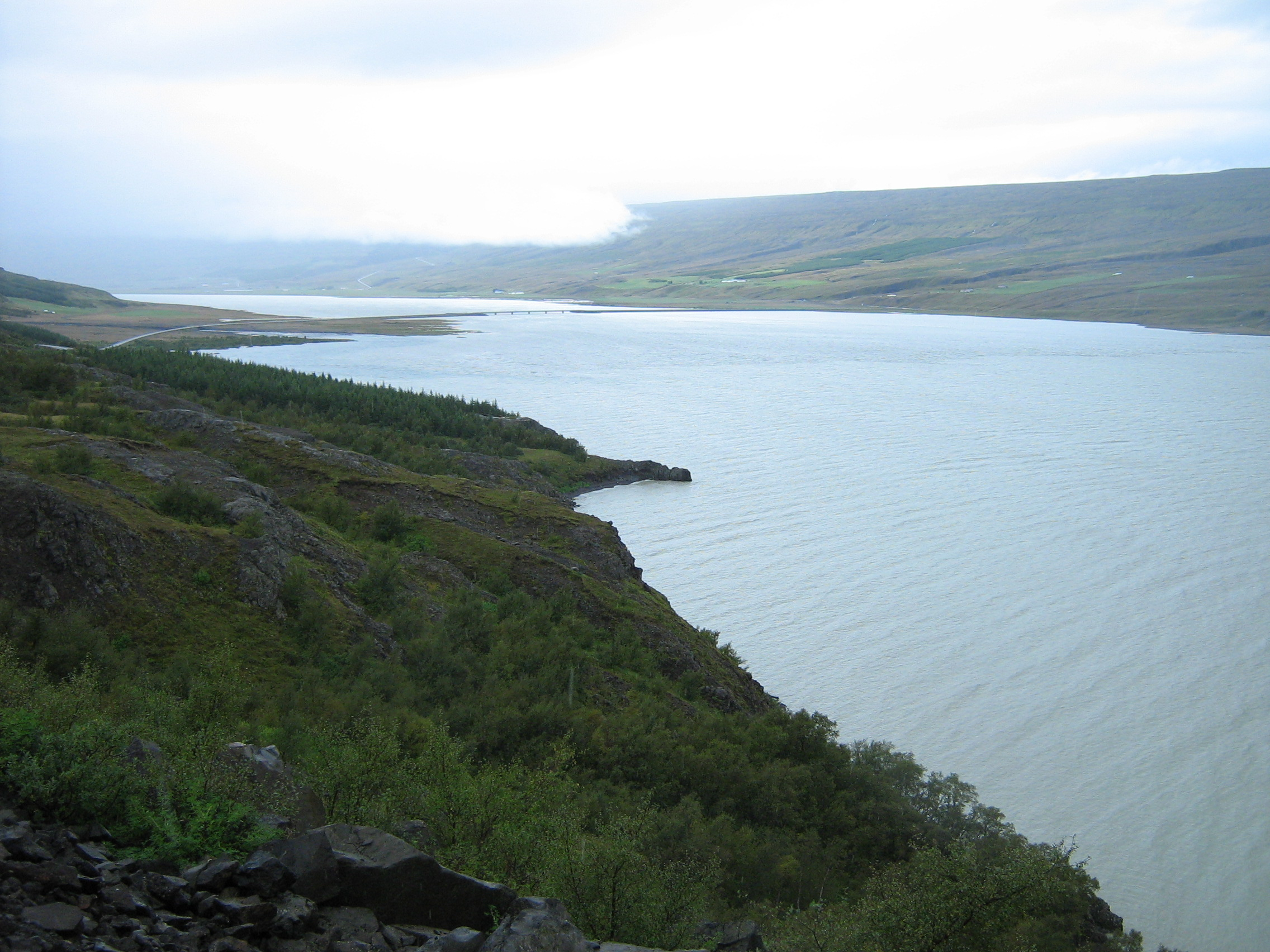 Island Egilsstadir Lagarfljot See